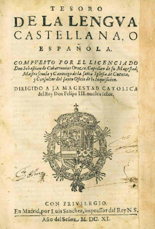 Cubierta del Tesoro de la lengua castellana o española de Sebastián de Covarrubias